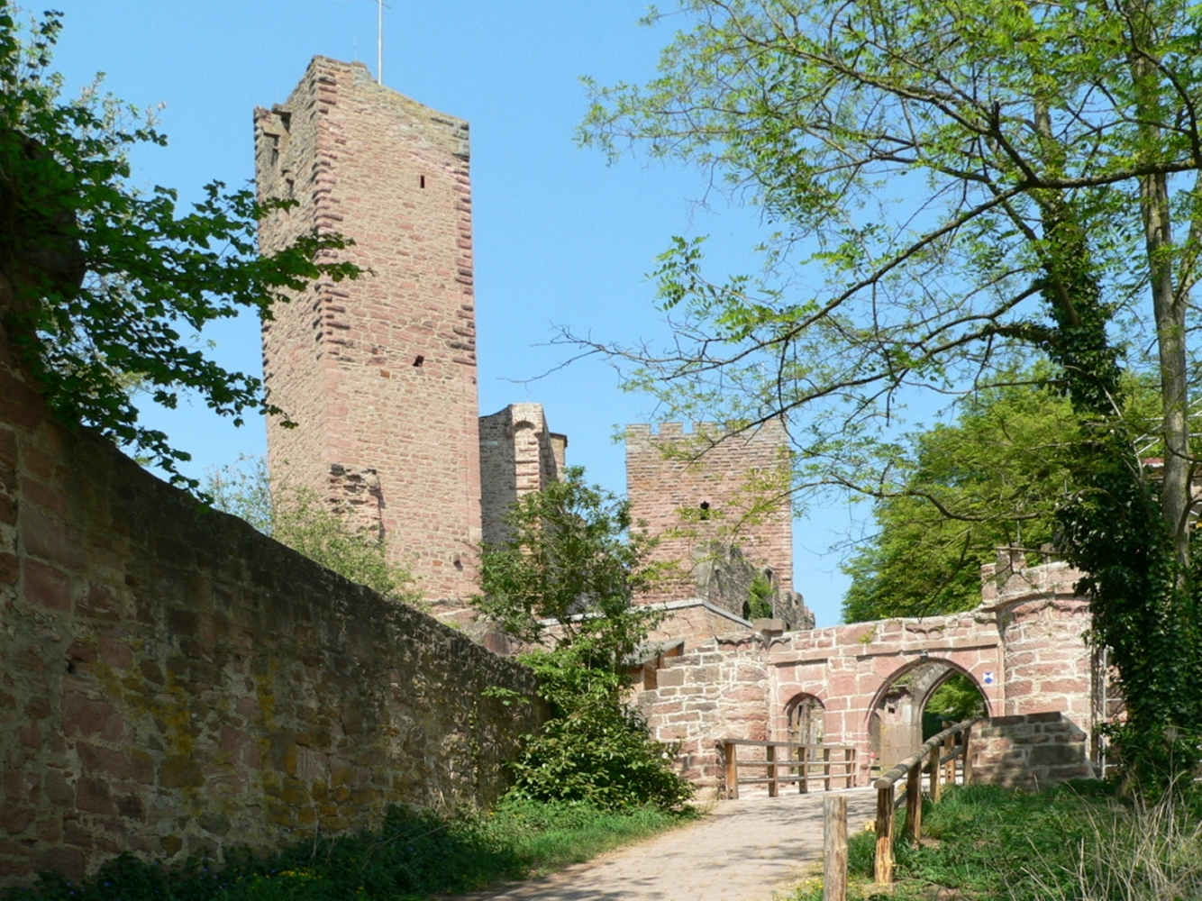 Henneburg oberhalb von Stadtprozelten am Main, Germany